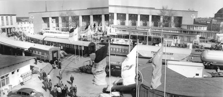 Leipzig, Herbstmesse, Schienenfahrzeuge ADN-ZB Schaar 16.3.1972-bi.-Leipzig: Messe - Vielfältiges Angebot an Schienenfahrzeugen- Allein 10.000 Quadratmeter Ausstellungsfläche nimmt im Südteil des Messegeländes der Schienenfahrzeugbau der DDR als größter Aussteller dieser Branche in Anspruch. Weiterhin sind Exponate aus der UdSSR, der CSSR, aus Rumänien, Jugoslawien, Frankreich, Österreich und Schweden zu sehen.